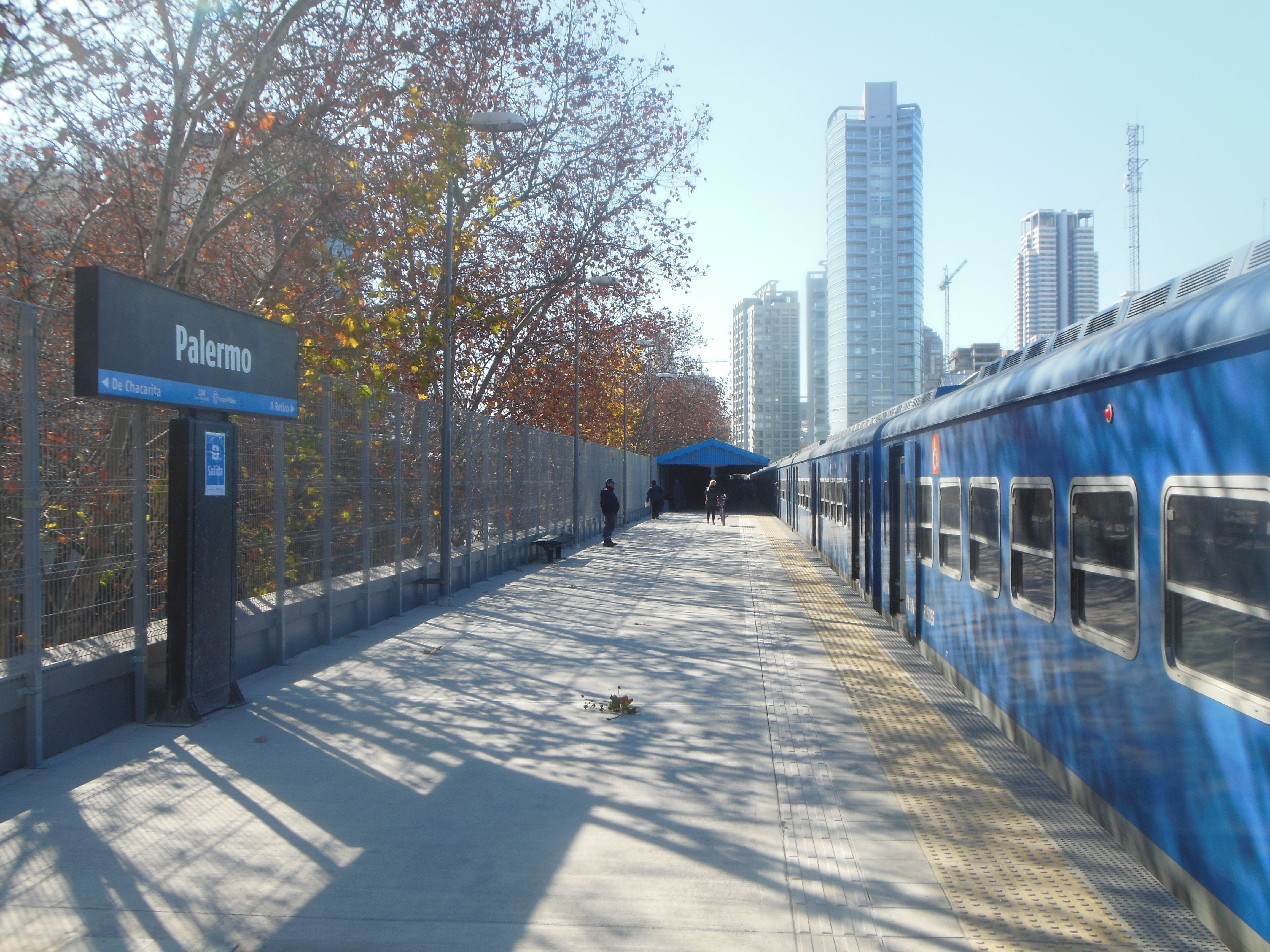 Estación Palermo del Ferrocarril San Martín